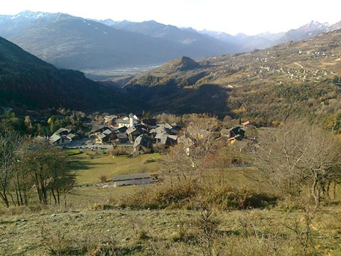 Vue sur le village d'Icogne depuis les Vernasses.